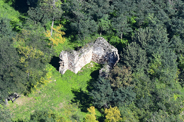 Sabar-hegyi templomrom légi felvételen